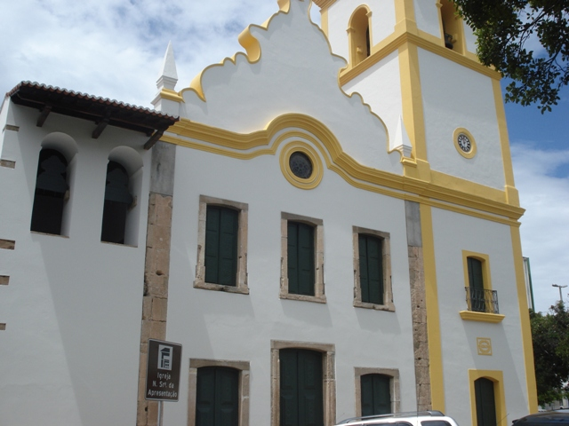 Igreja Matriz de Nossa Senhora da Apresentação em Natal, Rio Grande do Norte, Brasil.